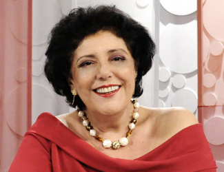 Apresentadora brasileira Leda Nagle em imagem promocional da TV Brasil.